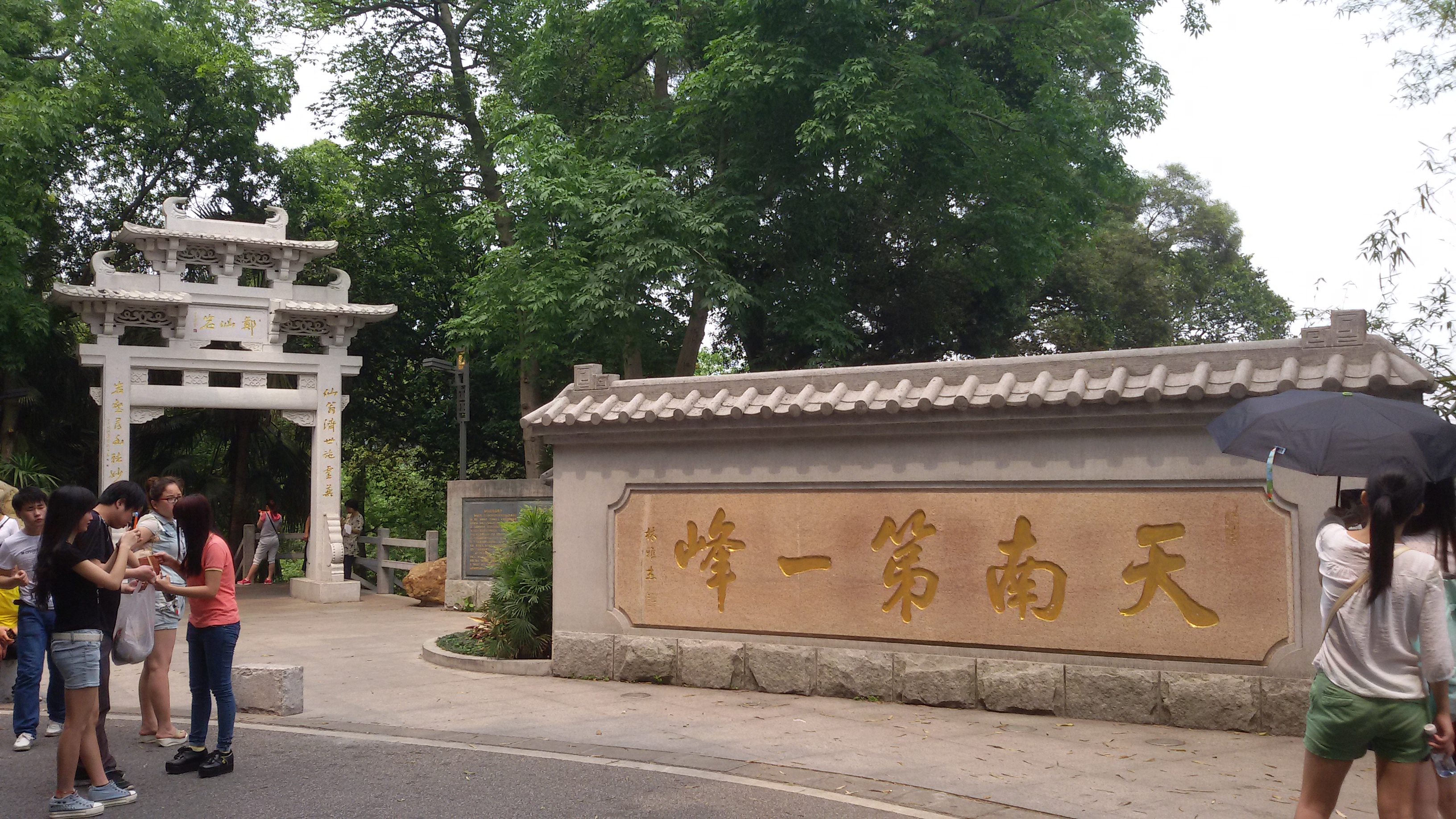 粵語: 廣州白雲山風景區 — 天南第一峰